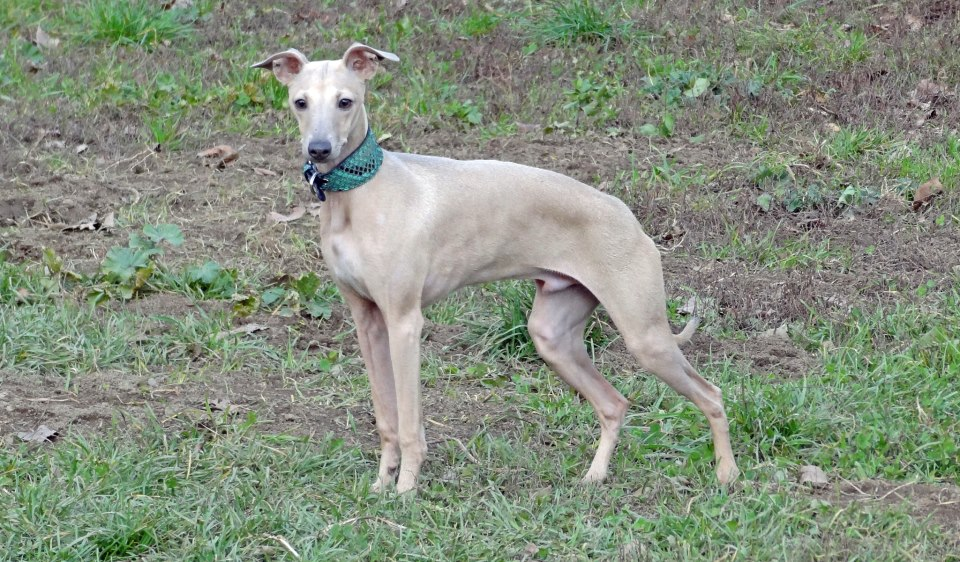 YURI - Piccolo Levriero Italiano - Novembre 2012 - Fotografo: Luigi Griffini